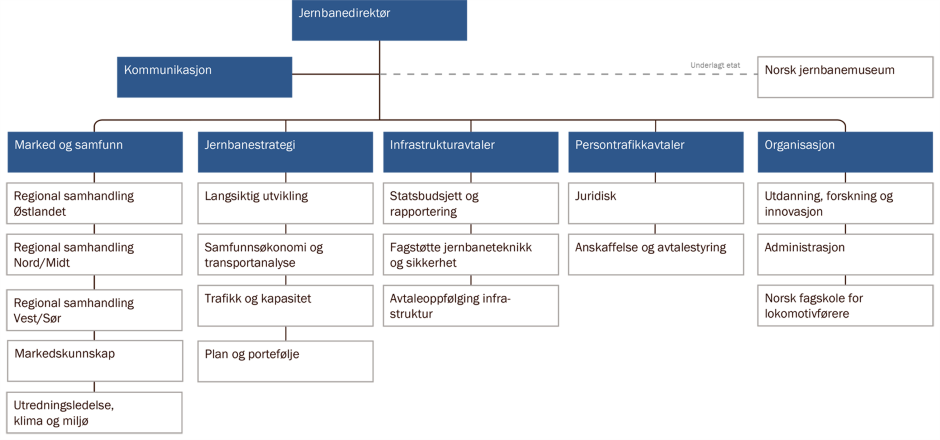 Organisasjonskart Jernbanedirektoratet, oktober 2019